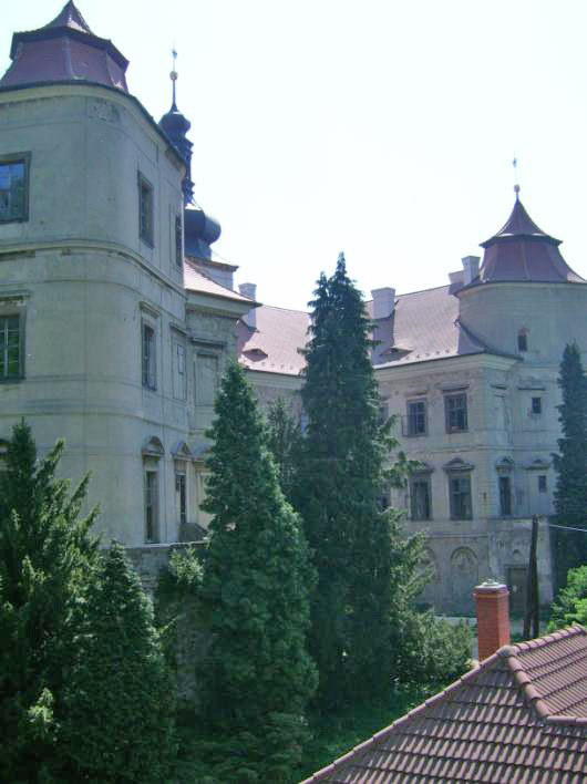 Zámek Jezeří - Pohled na západní průčelí zámku